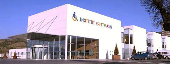 Fachada Intituto Guttmann